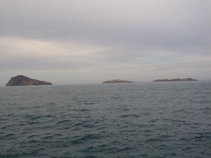 Vista de las islas Chafarinas (España) desde el Cabo de Agua (Marruecos)